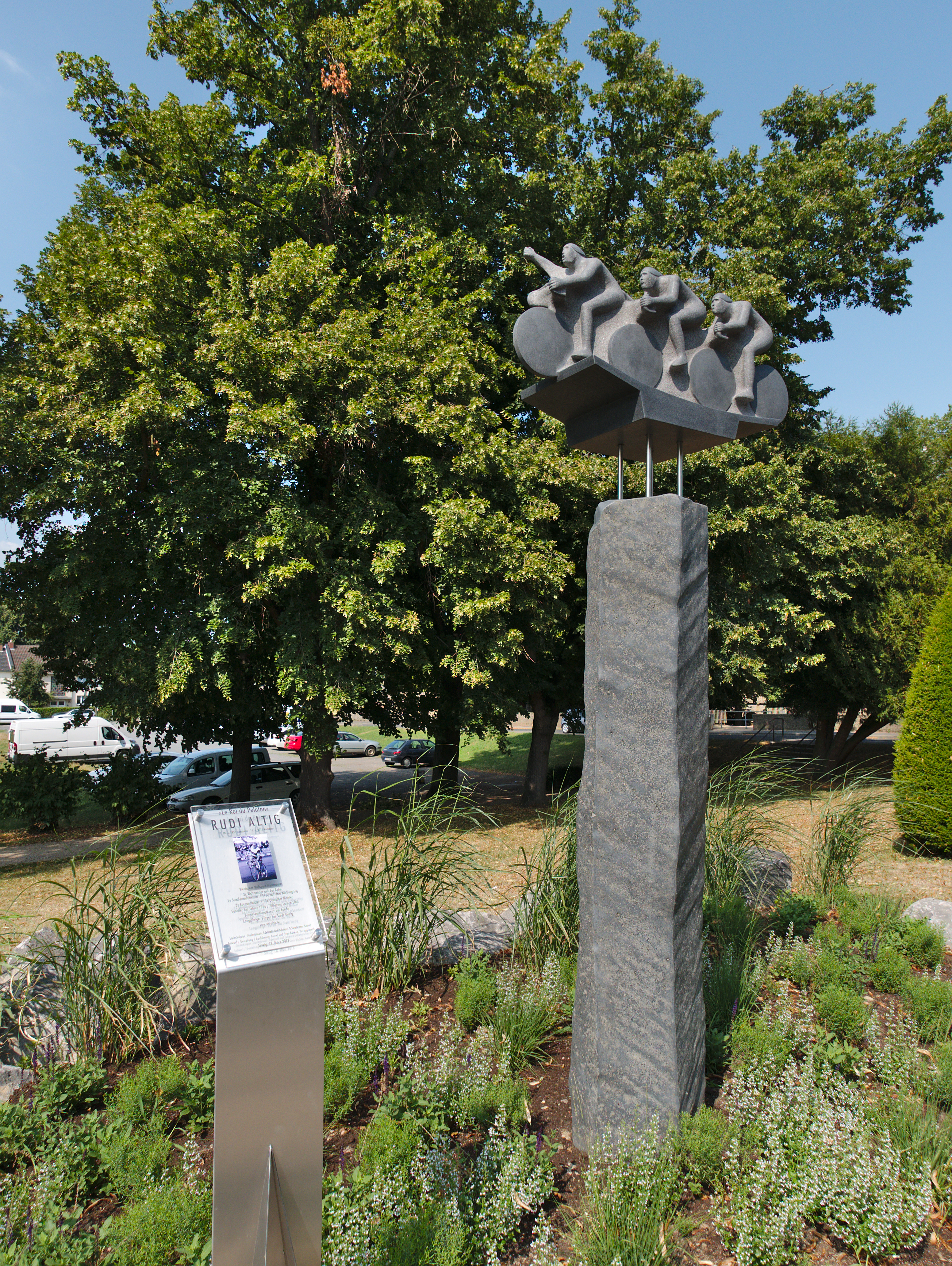 Denkmal Le Roi du Peloton zur Erinnerung an Rudi Altig in Sinzig